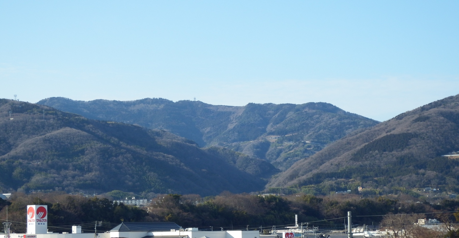 大滝山を麓の脇町から